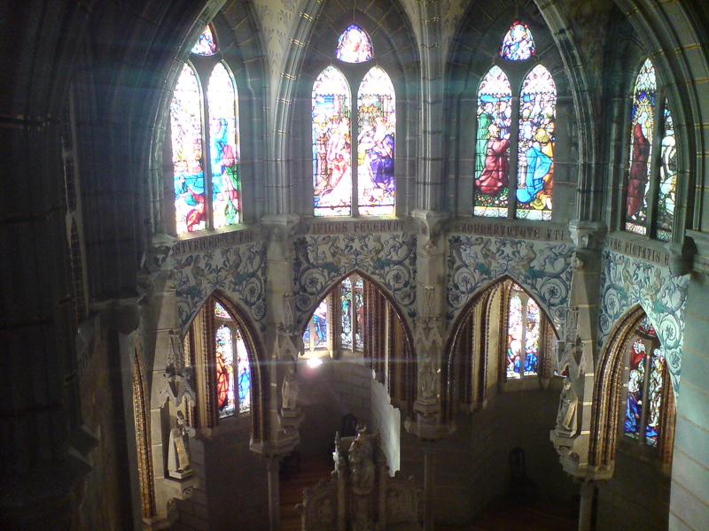 Palacio Episcopal por dentro. Foto realizada el 7/Agosto/2008